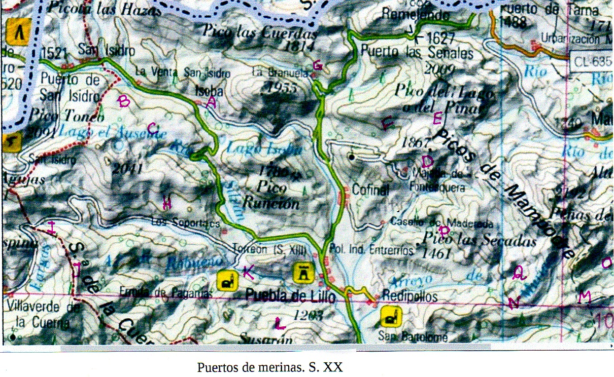 Mapa puertos ganado trashumante cabecera del Porma